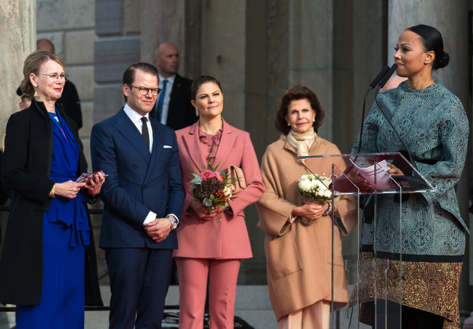 Alice Bah Kuhnke i närvaro av HM Drottningen, HKH Kronprinsessan Victoria och HKH Prins Daniel och överintendent Susanna Pettersson i samband med nyinvigningen av Nationalmuseum i Stockholm den 13 oktober 2018.